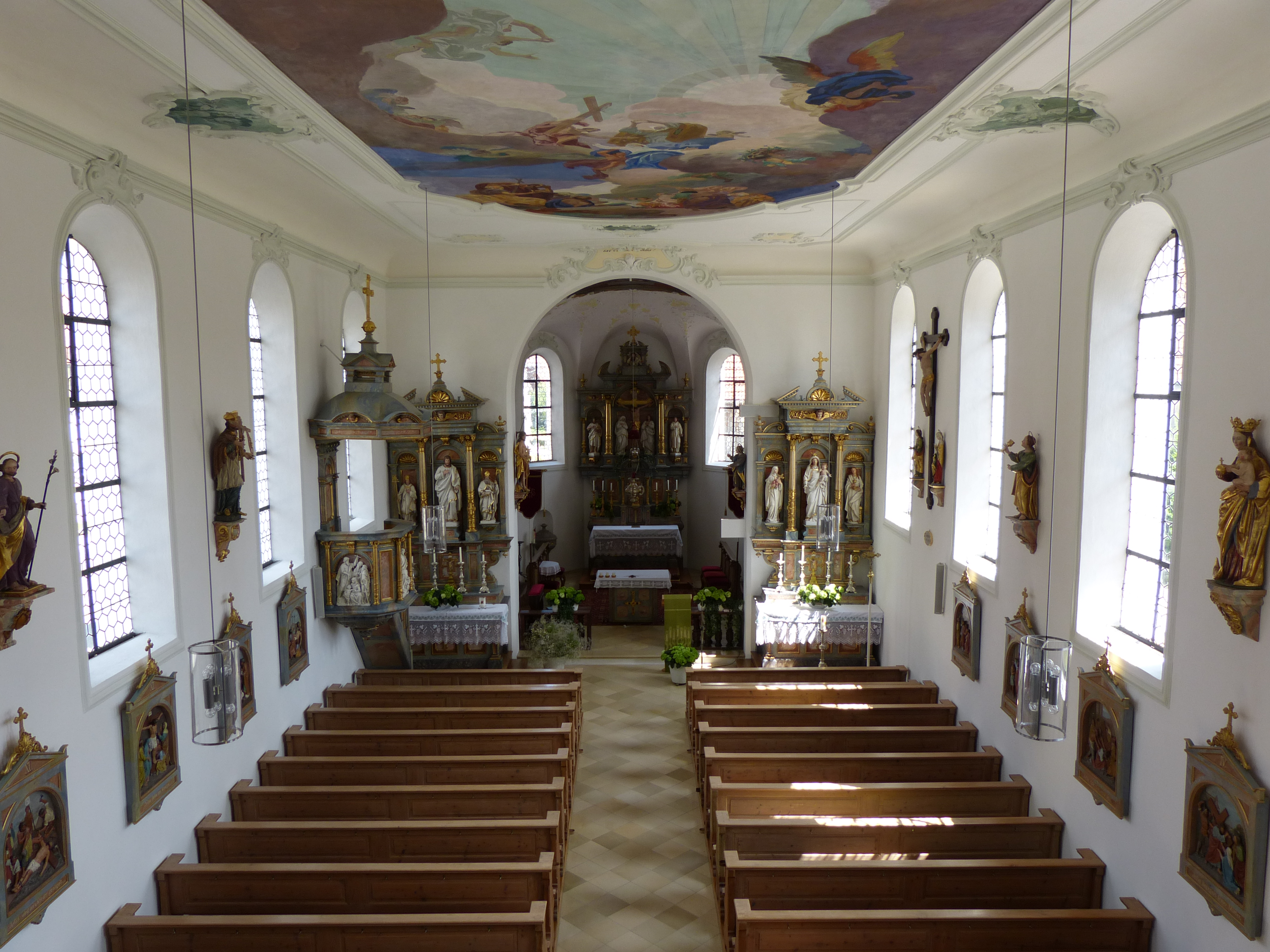 St. Johannes Baptist, Salgen, Landkreis Unterallgäu, Bayern